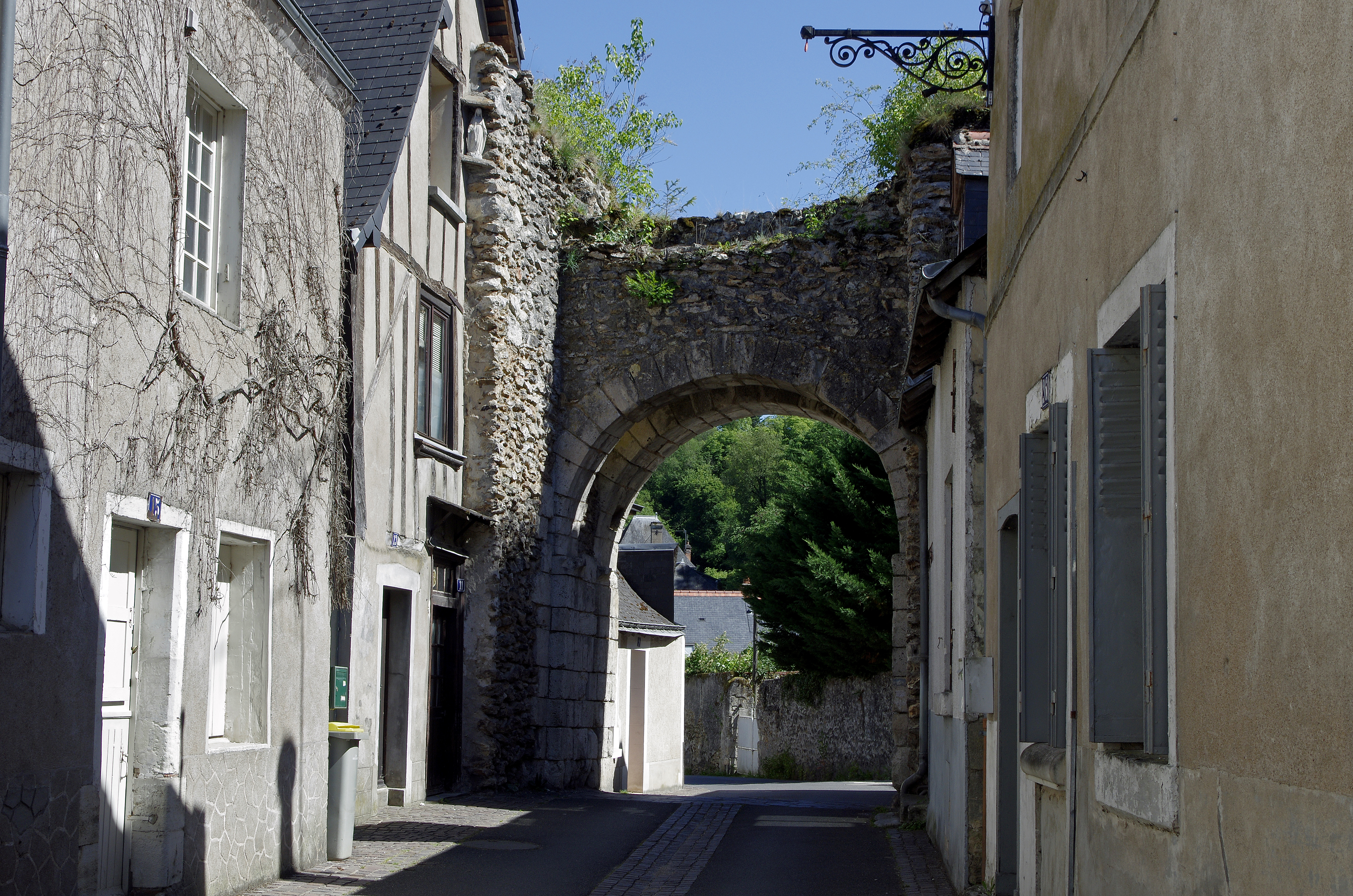 Montbazon (Indre-et-Loire) La Porte des Moulins (rue des Moulins). C'est une porte fortifiée du XVe siècle. Les remparts et les trois autres portes on été détruits au XVIIIe siècle pour construire des routes. La porte de la Farté a été détruite ehn 1746, la porte de Tours en 1780 et la porte Saint-Jacques en 1794. La maison à colombage attenante est des XVe-XVIe siècles.